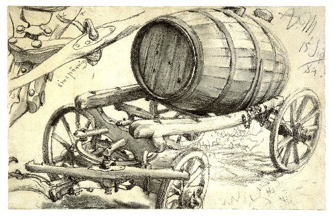 Jauchefass auf Wagen, Zeichnung von Adolph von Menzel, 1884, Bleistift auf Papier, 12,6 x 19,6 cm